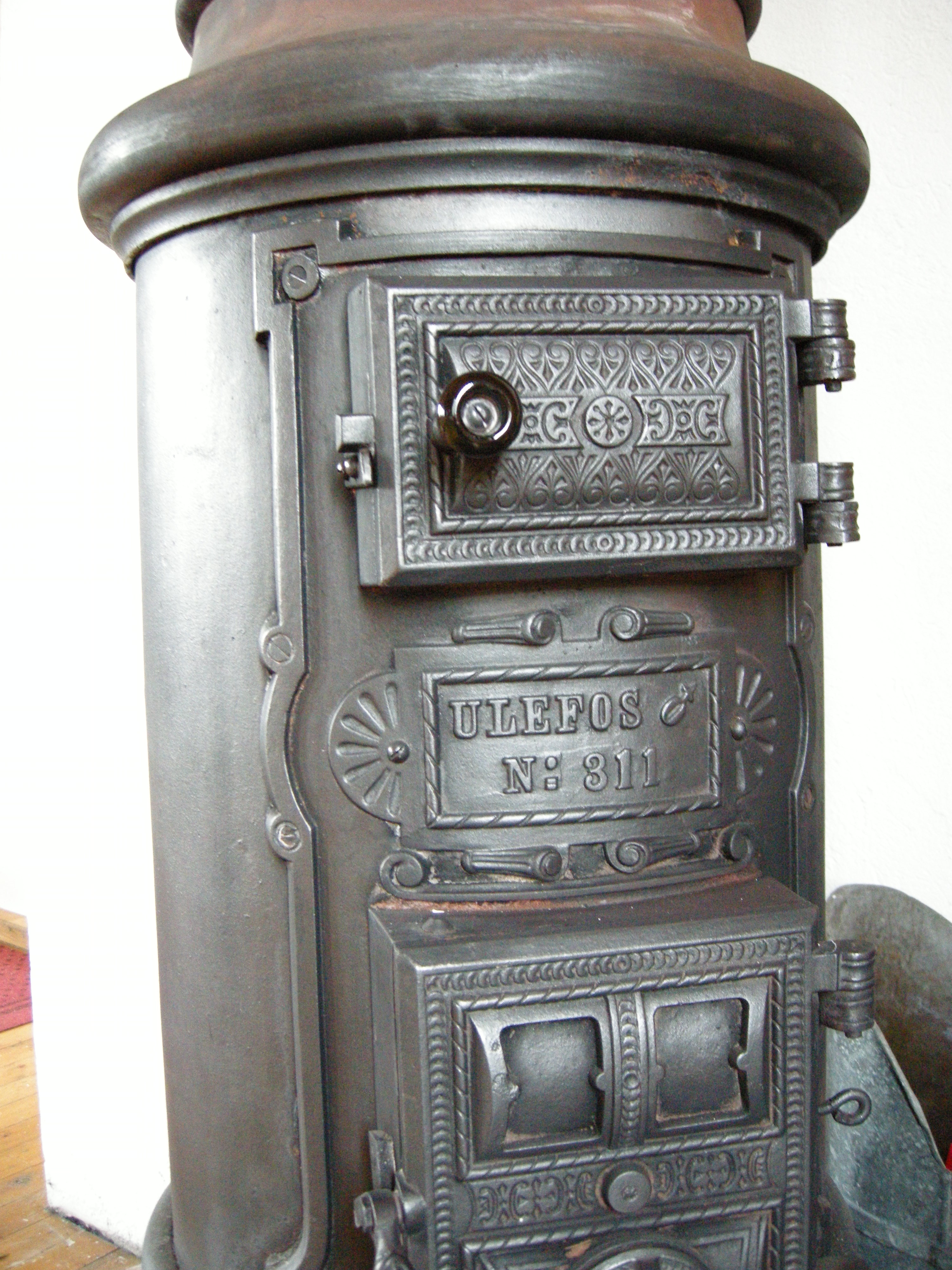 Ovn fra Ulefos - i Skarsvåg kirke, Nordkapp